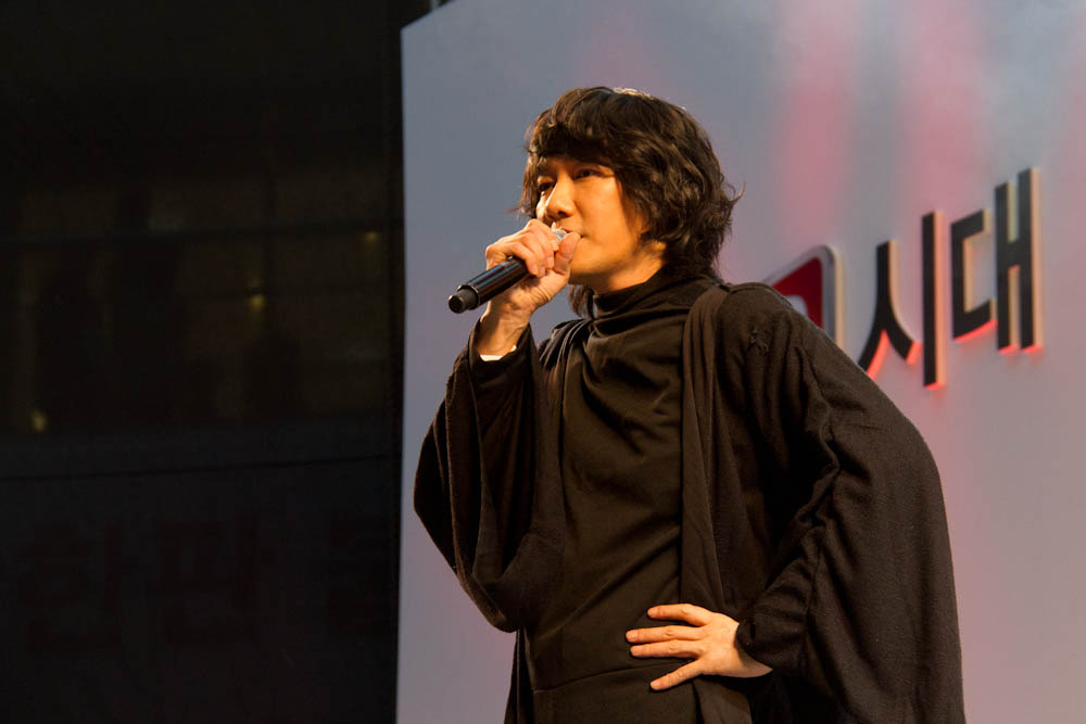 Lg전자가 3월 31일, 4월 1일 양일간 서울 잠실동 롯데월드 아이스링크에서 'lg 시네마3d 월드페스티벌'을 성황리에 개최했다. ※ LG전자 뉴스룸 에서 관련 보도자료를 확인실 수 있습니다.